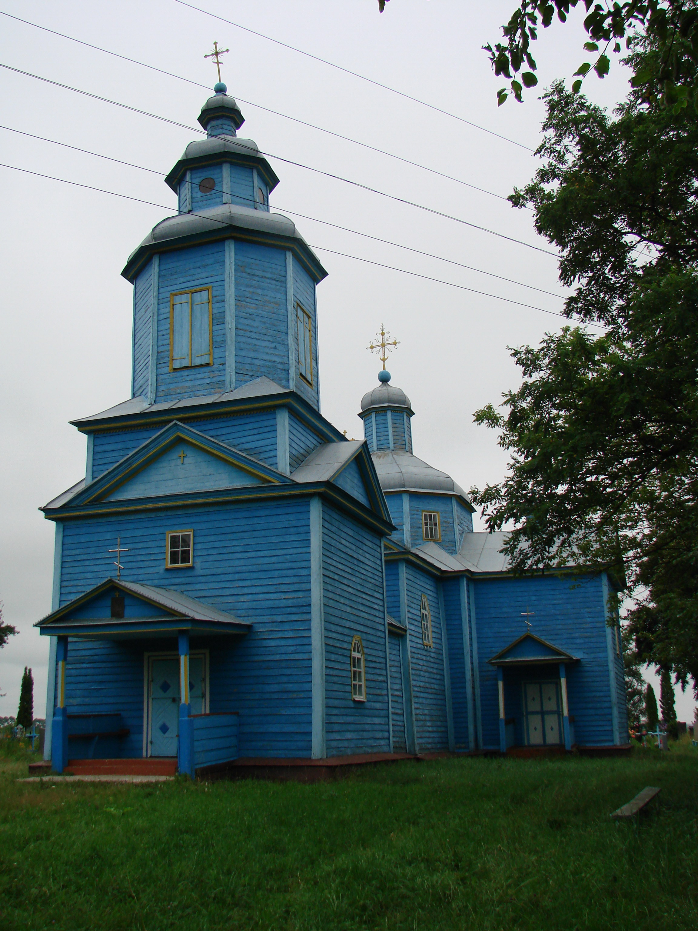 Покровська церква, с. Калинівка, вул. Гриценка